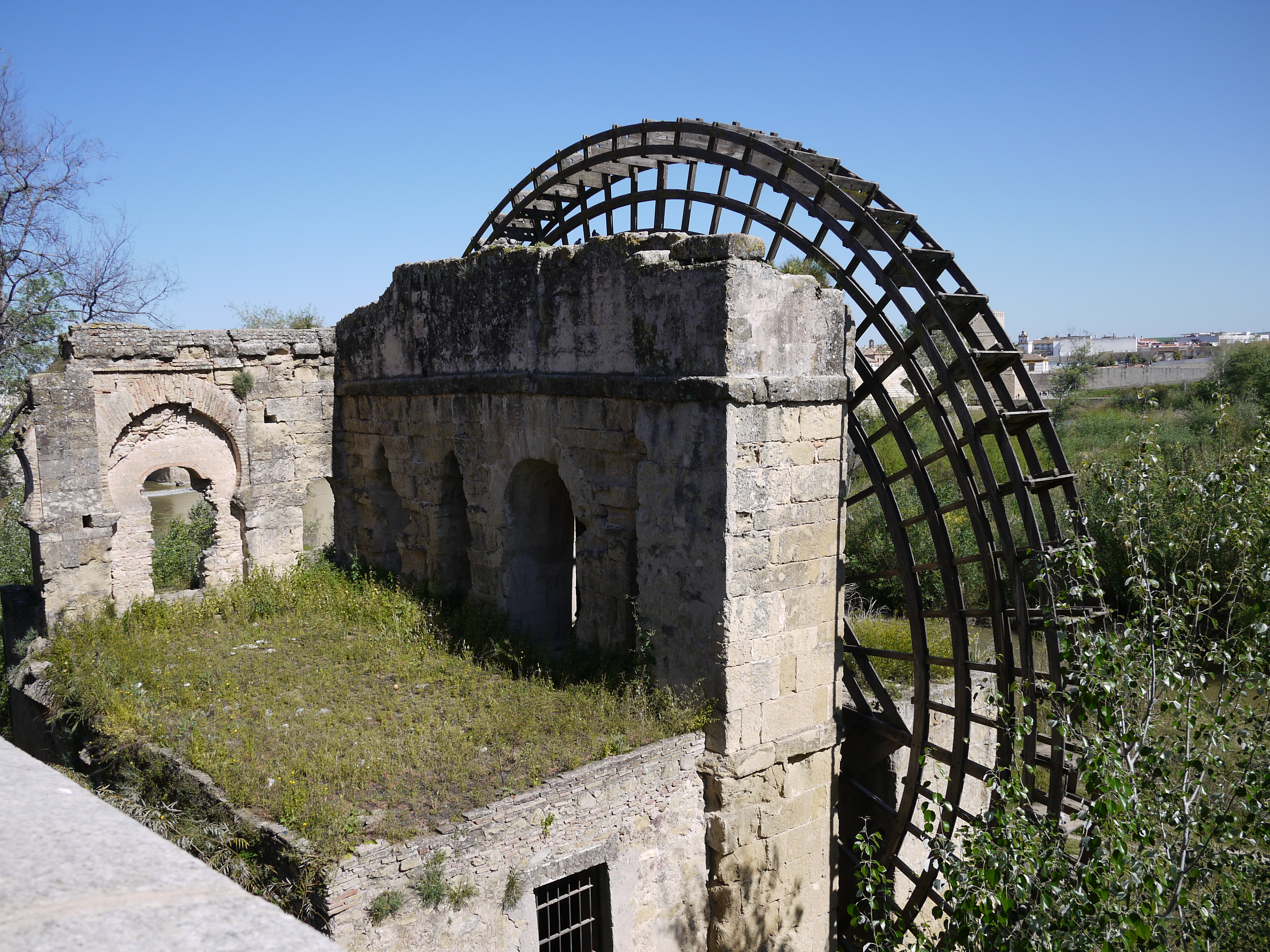 Córdoba preciosa